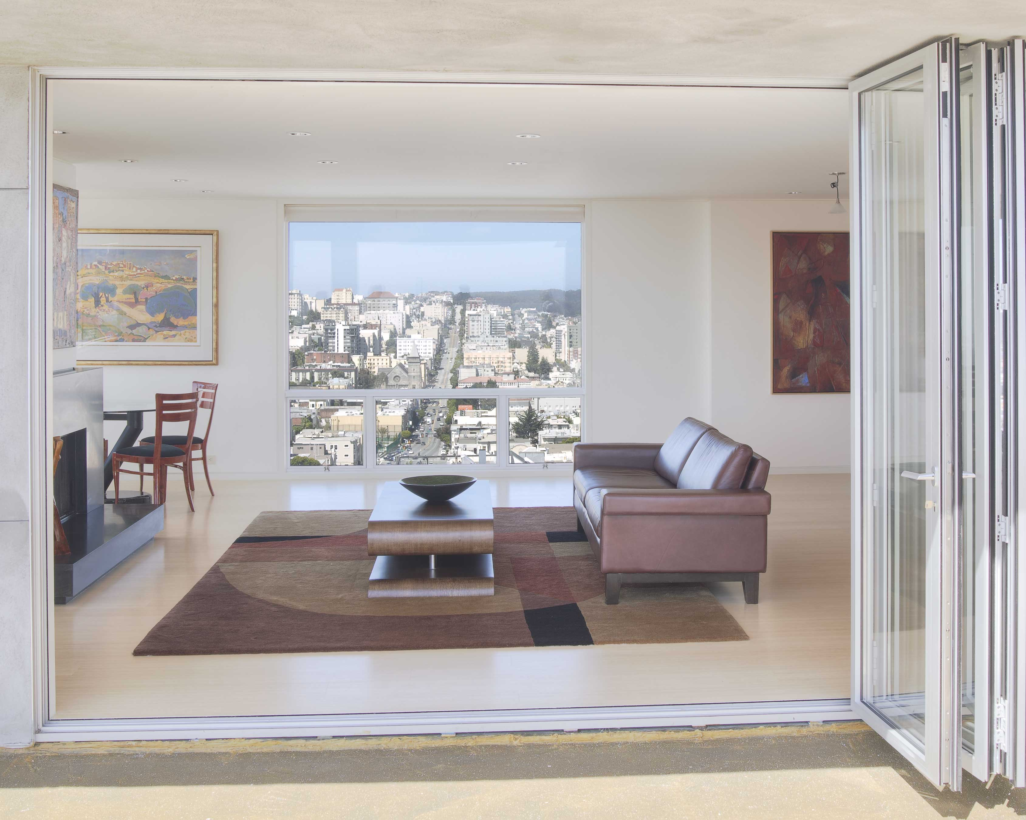 Faltwand angefaltet